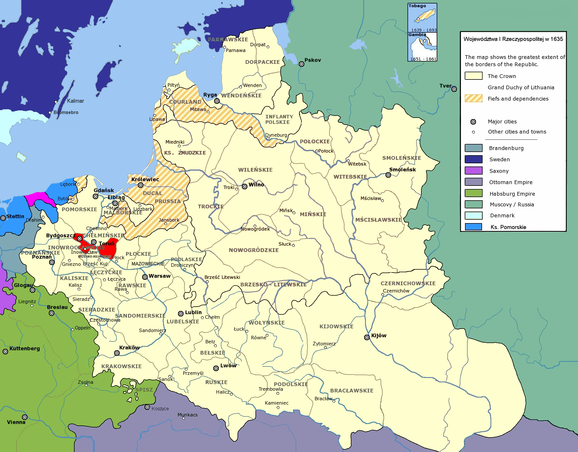 Rzeczpospolita Obojga Narodów w 1635 r.; województwo inowrocławskie Polish-Lithuanian Commonwealth in 1635; Inowrocław Voivodeship